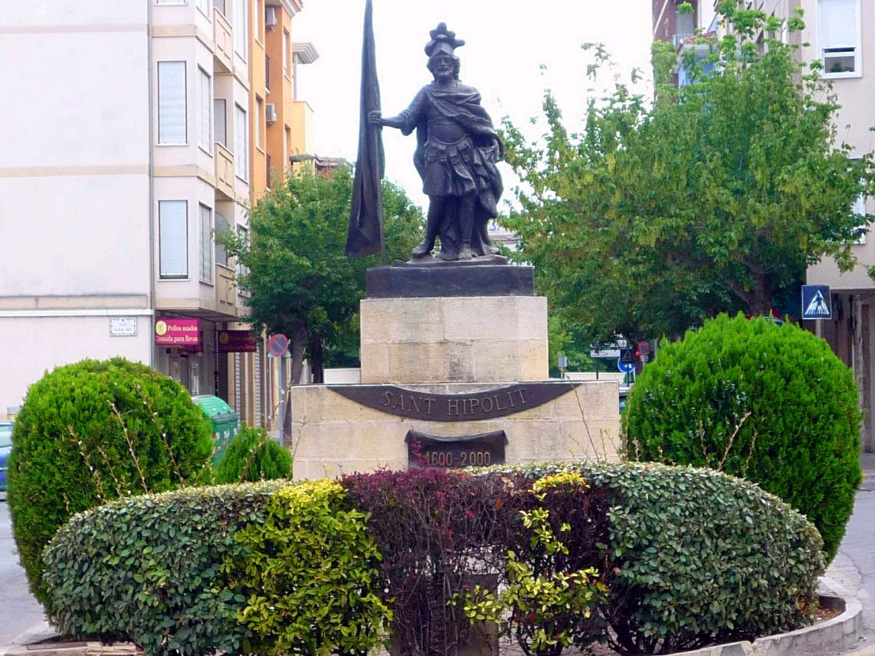 Cocentaina (Alicante) - Monumento a Sant Hipòlit